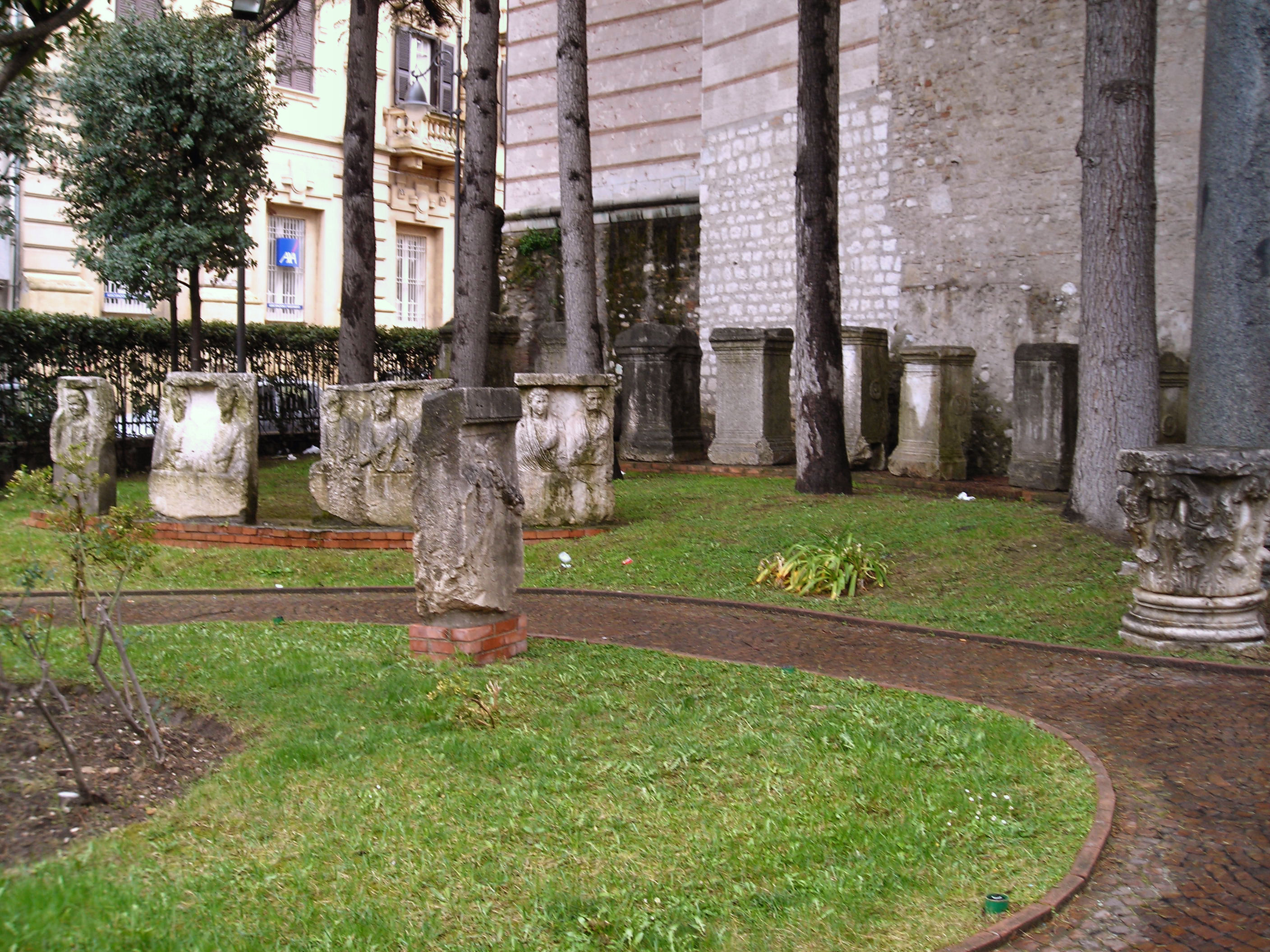 Lapidario romano, Museo del Sannio, Benevento